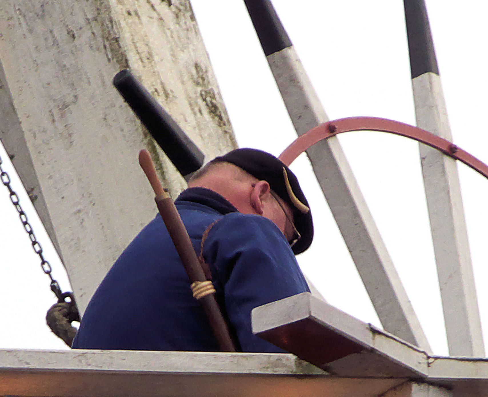 Midwinterhoorn met hap